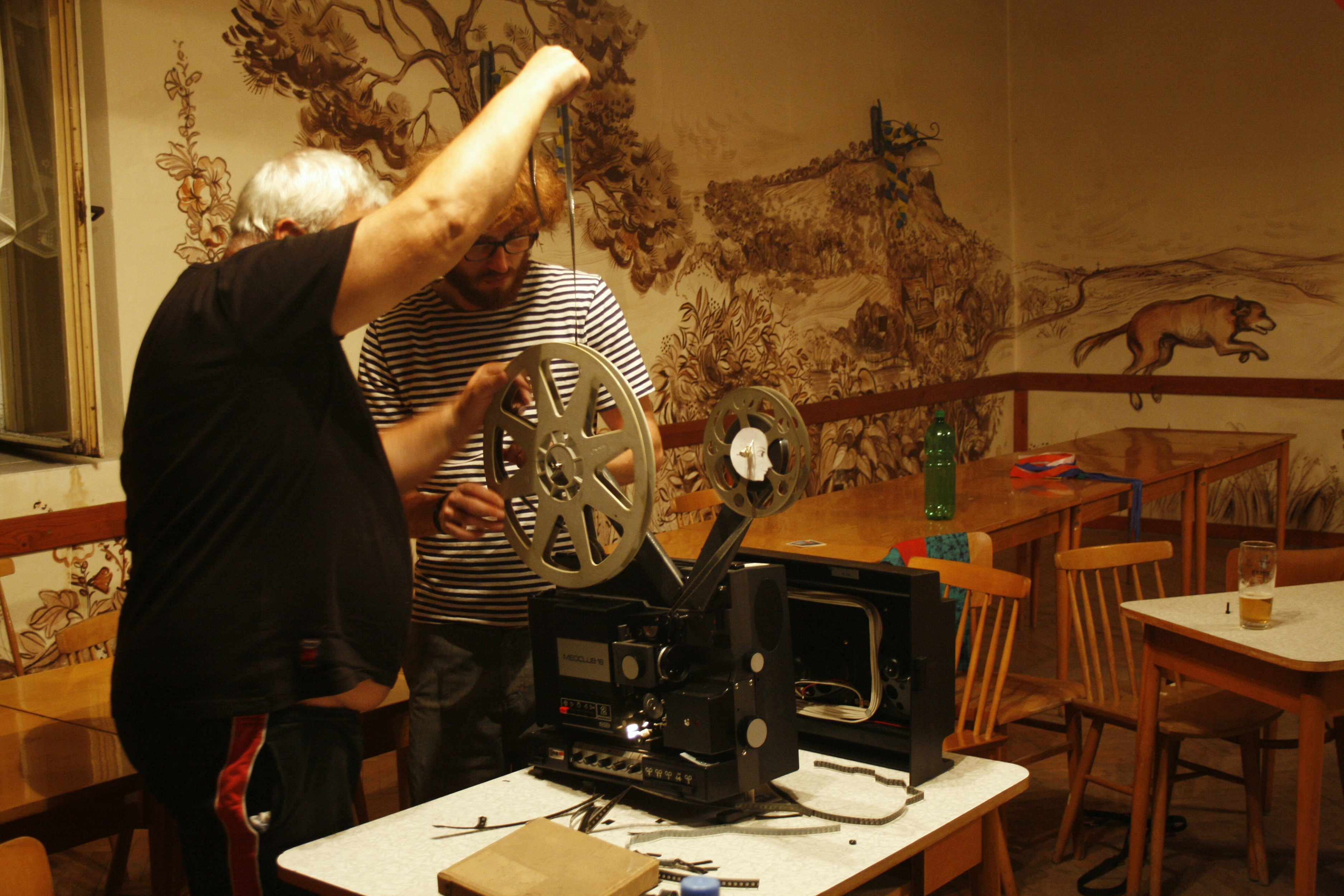 Animace na Hlinné - kurz pro veřejnost konaný ve dnech 25. až 26. července 2014 v obci Hlinná na Litoměřicku. Promítačka Meoclub 16 - electronic 2, vyráběná v letech 1982 až 1984 firmou Meopta. Personality rights warningAlthough this work is freely licensed or in the public domain, the person(s) shown may have rights that legally restrict certain re-uses unless those depicted consent to such uses. In these cases, a model release or other evidence of consent could protect you from infringement claims.